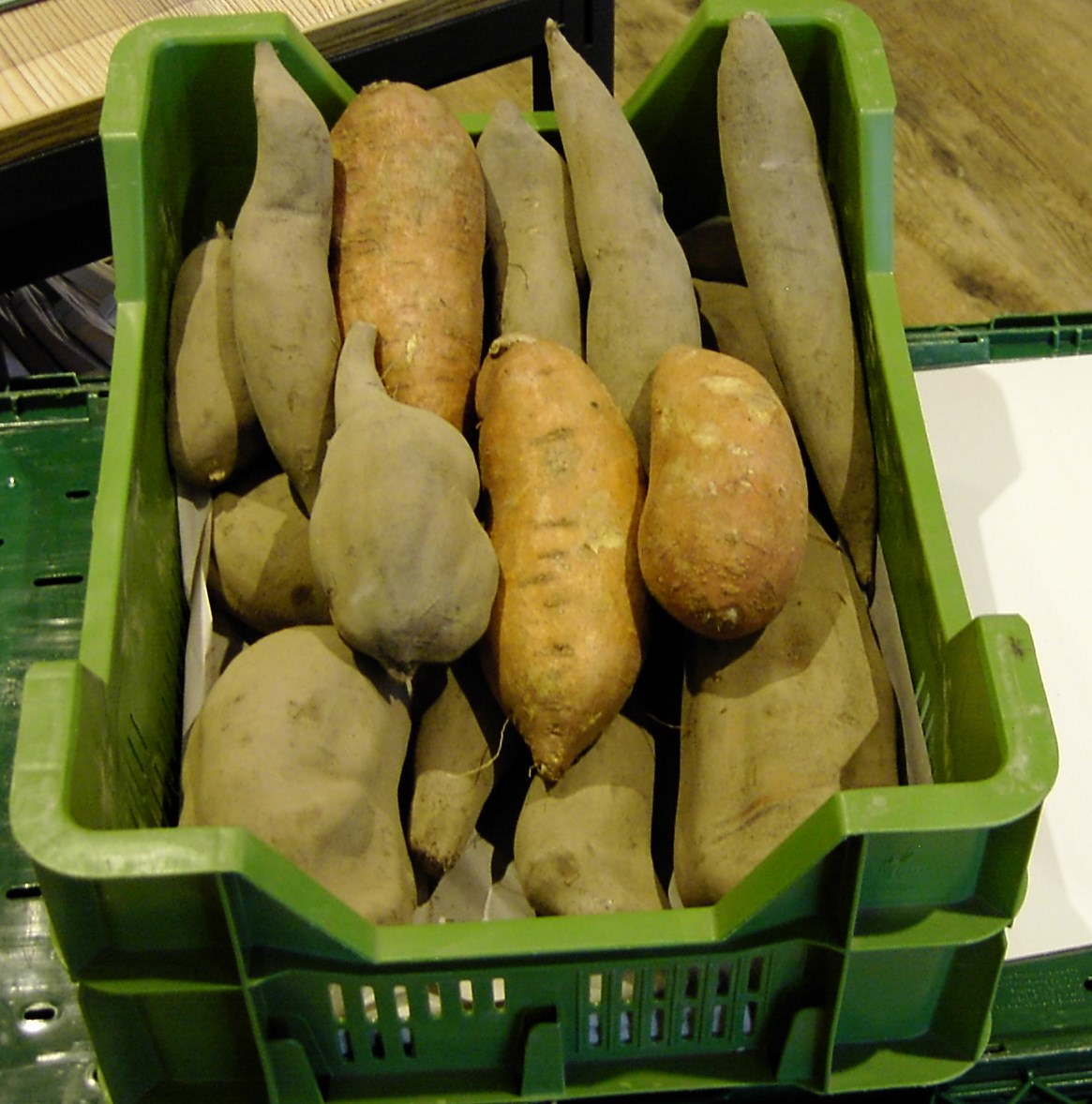 Yacon mit 3 Süsskartoffeln